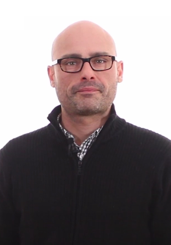 En este vídeo, nuestro diputado Txema Guijarro, explica como muchas de nuestras administraciones públicas conceden contratos a empresas pirata como Marsegur, que no cumplen los convenios laborales estatales. Esto se debe a la reforma laboral y a la antigua ley de sector público, que priman precio sobre calidad y derechos